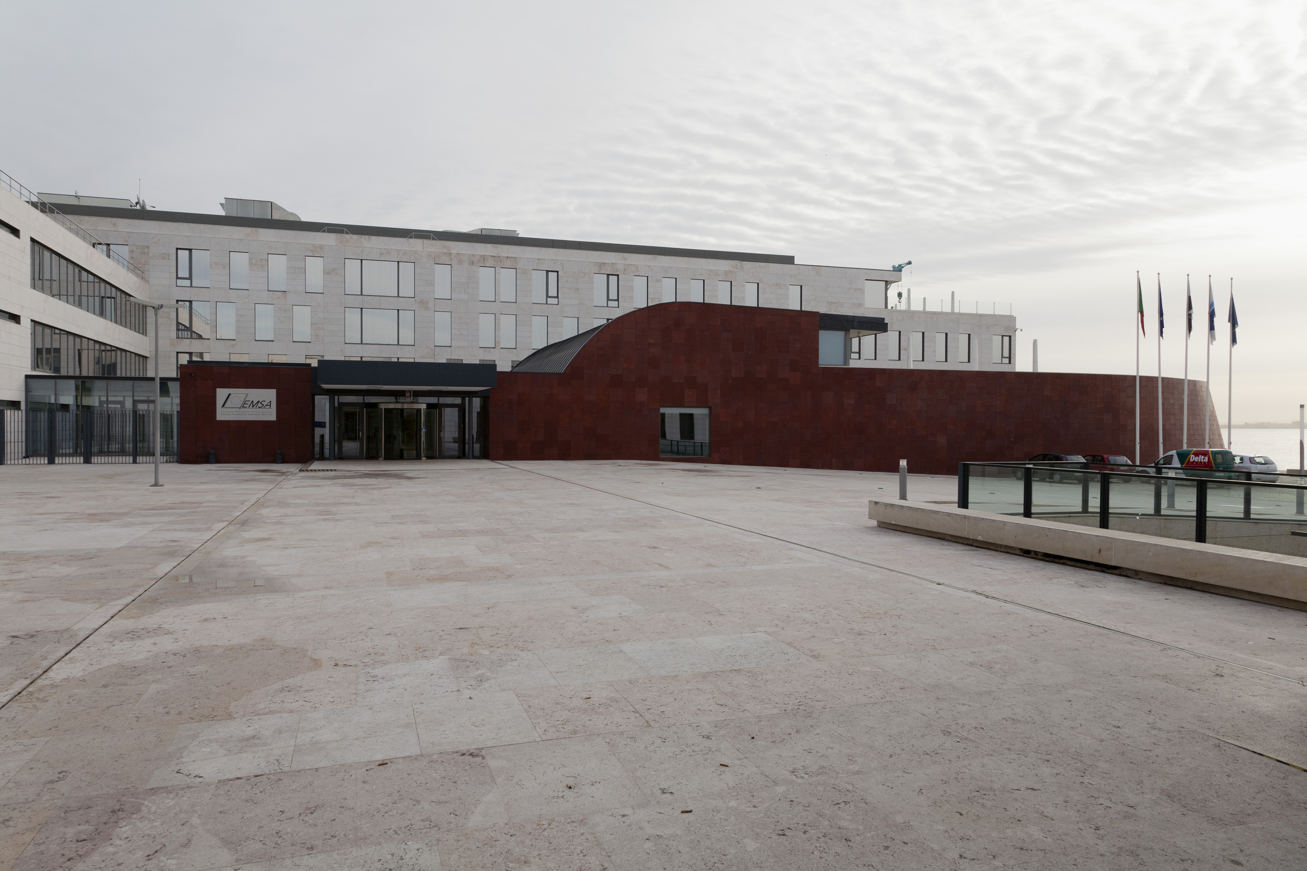 Conjunto de edifícios (Agência Europeia de Segurança Marítima), Cais do Sodré, Lisboa; Arq. Manuel Tainha